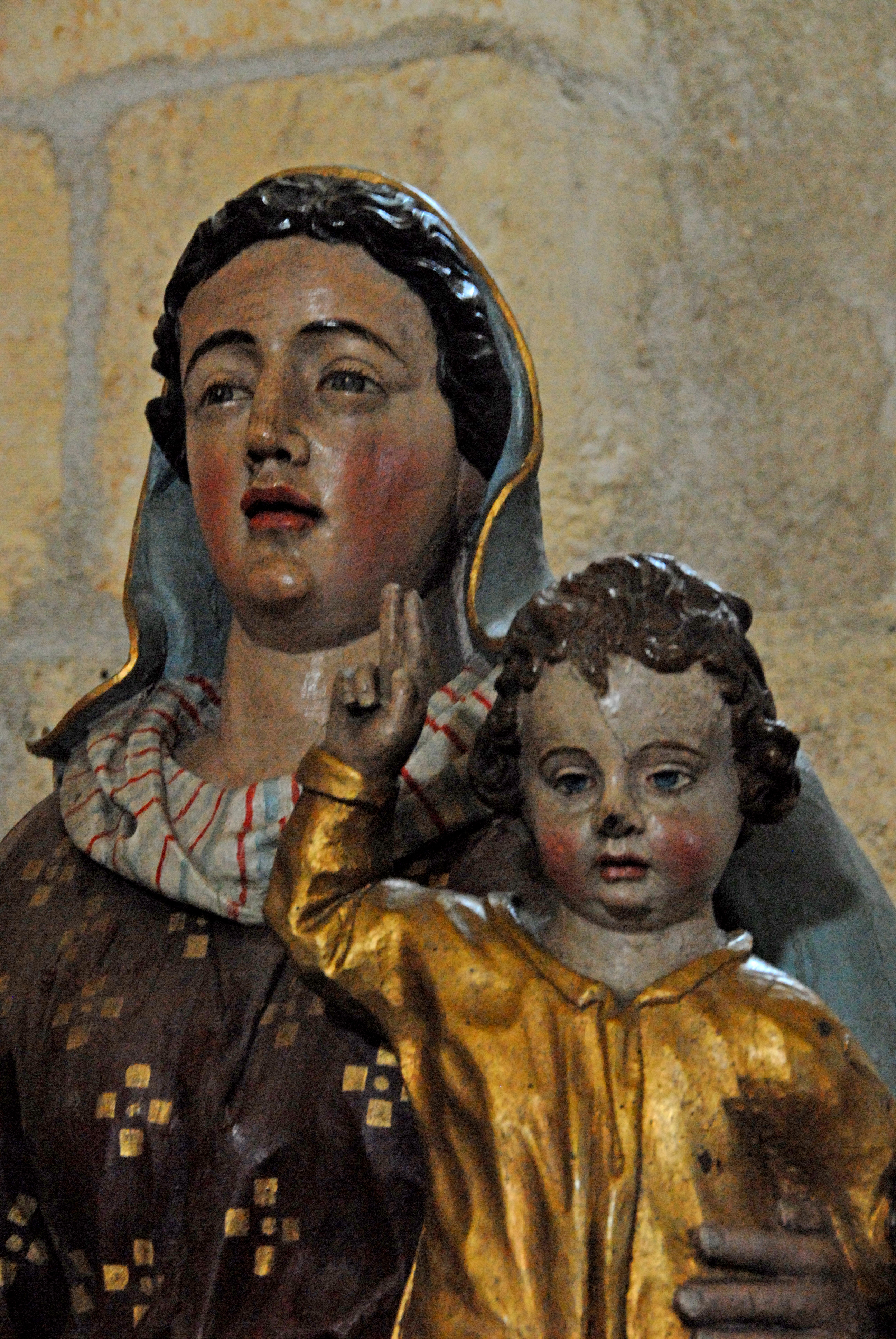 Saint-Bris-de-Bois, Madonna mit Kind, Detail